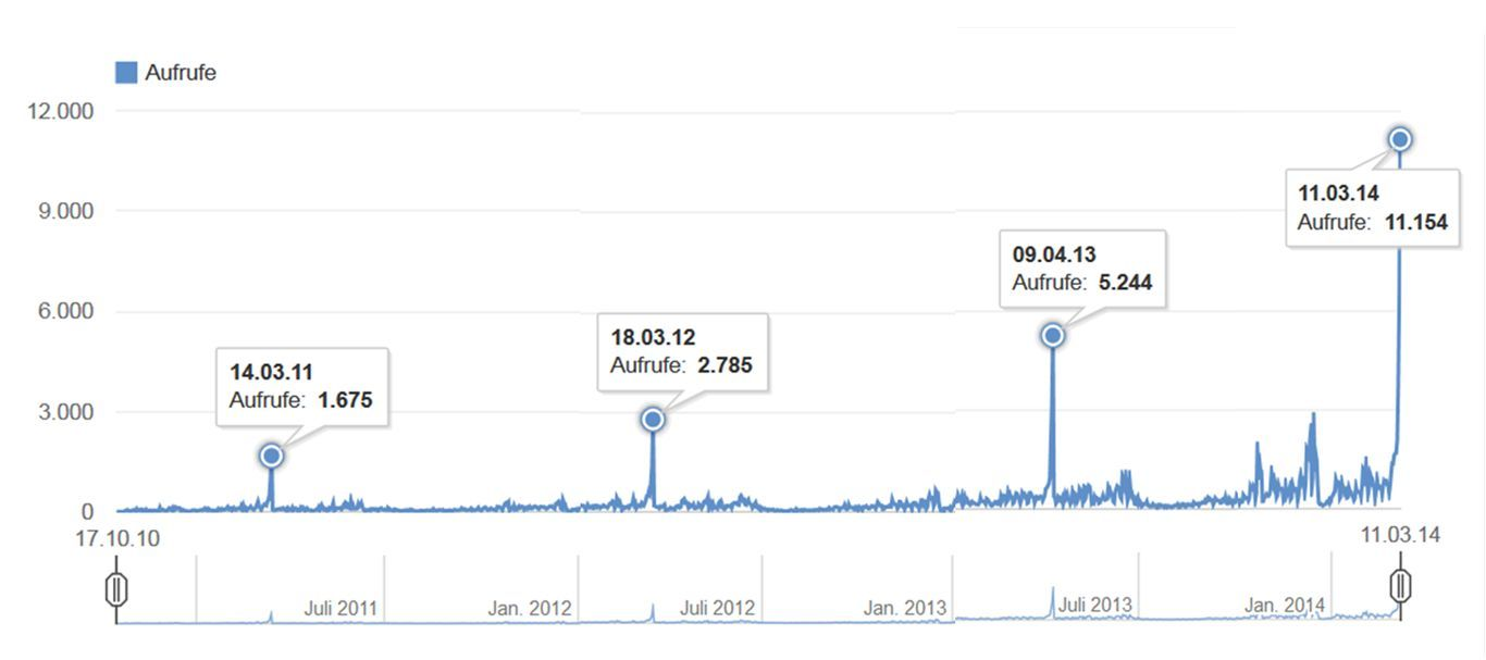 FT YouTube Statistik am Tag vor dem Deutsch-Abitur, Financial T(’a)ime, Schülerzeitung der Kaufmännischen Schule Tauberbischofsheim